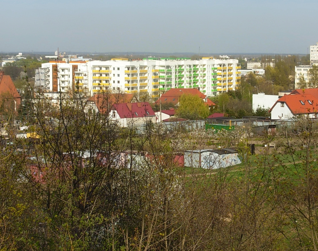 Osiedle mieszkaniowe przy ul. Bełzy-Toruńskiej na Kapuściskach. Widok z Wyżyn